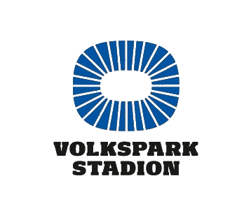 Logo des Volksparkstadions (2015)